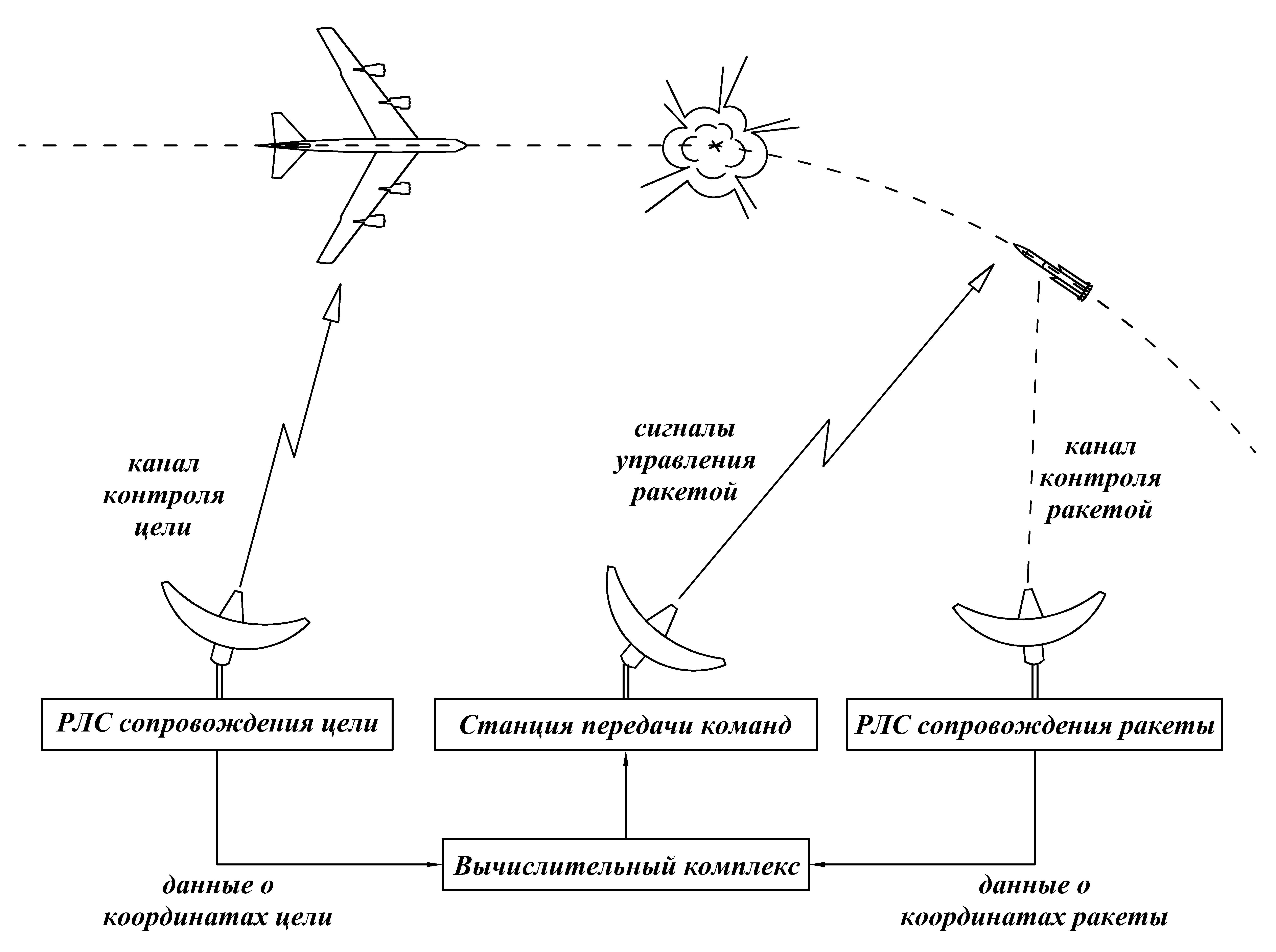 Дистанционное (командное) наведение зенитных ракет. Для основы взята иллюстрация в ВЭС ( Военный энциклопедический словарь (ВЭС),М.,ВИ,1984 г., страница 468)